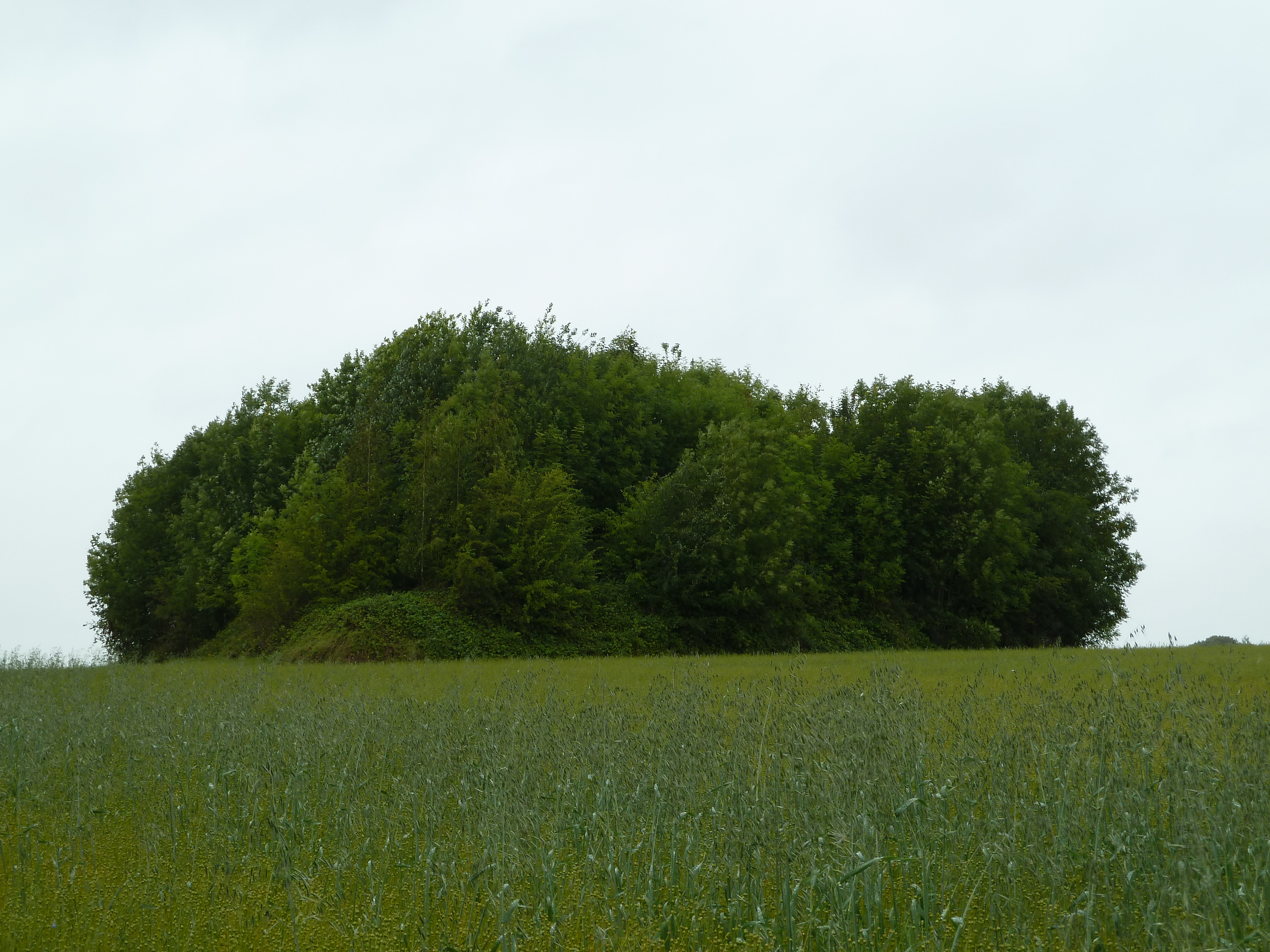 Tumulus d'Aineffe, Aineffe, Faimes, Belgique